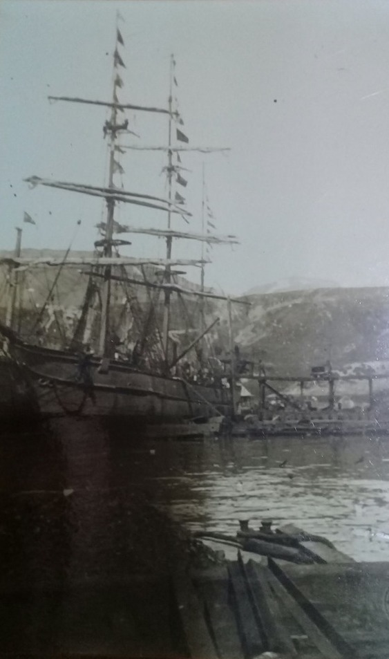 Buque 'Tijuca' de la Compañía Argentina de Pesca, en Puerto Grytviken (Isla San Pedro, Georgias del Sur), siendo cargado; notese el sistema decauville de vagonetas en el muelle de atraque, empujadas por fuerza humana (Foto: Archivo General de la Nación)